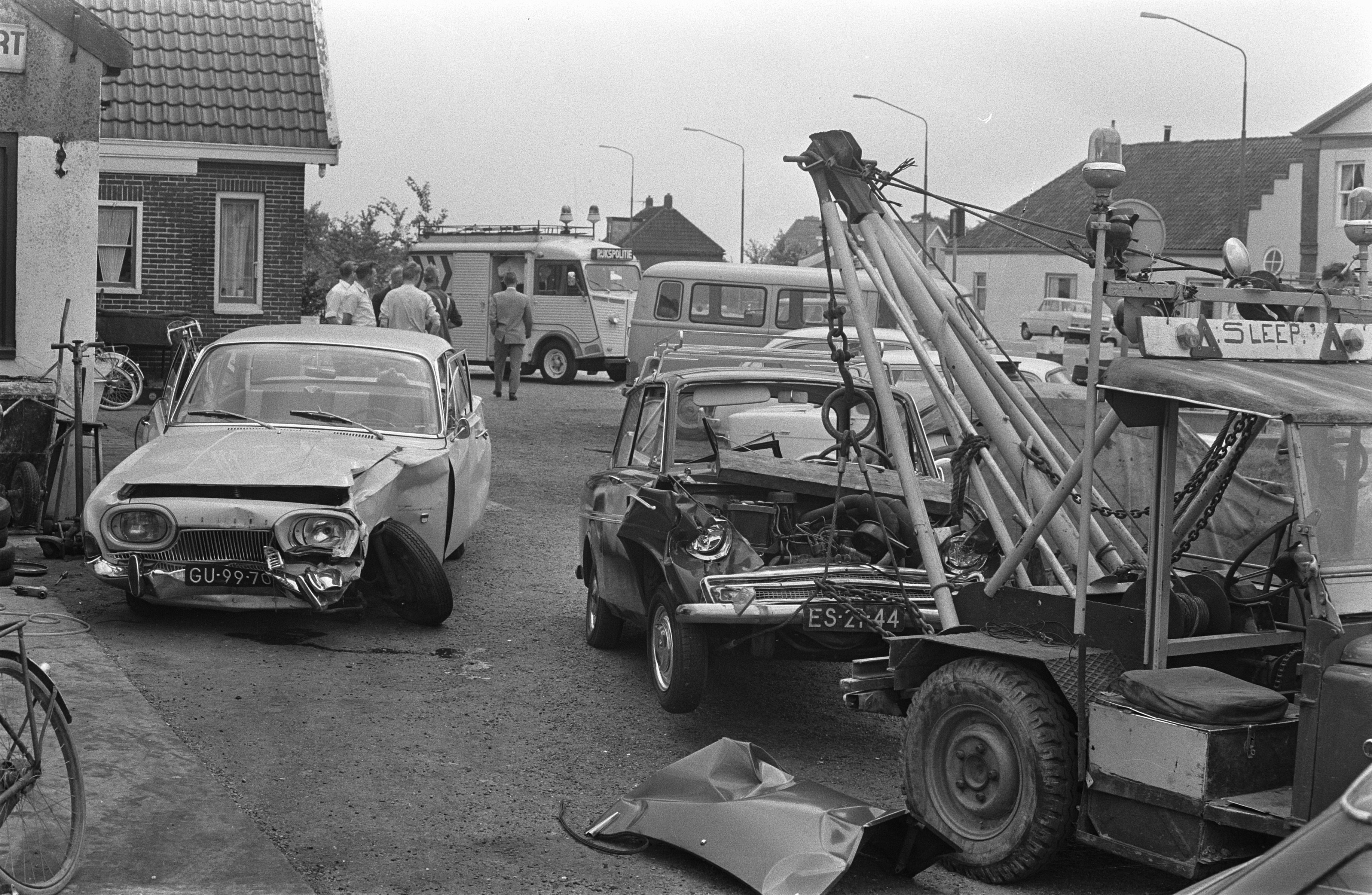 Collectie / Archief : Fotocollectie Anefo Reportage / Serie : Drie auto's zijn op de spoorwegovergang bij Oosthuizen door een trein geraakt Beschrijving : Twee van de weggesleepte auto's Annotatie : randnummers negatiefstrook: nr. 5: de spoorwegovergang bij Oosthuizen Datum : 20 juli 1969 Locatie : Noord-Holland, Oosthuizen Trefwoorden : auto's, spoorwegovergangen, treinen, wrakken Fotograaf : Fotograaf Onbekend / Anefo Auteursrechthebbende : Nationaal Archief Materiaalsoort : Negatief (zwart/wit) Nummer archiefinventaris : bekijk toegang 2.24.01.05 Bestanddeelnummer : 922-6455